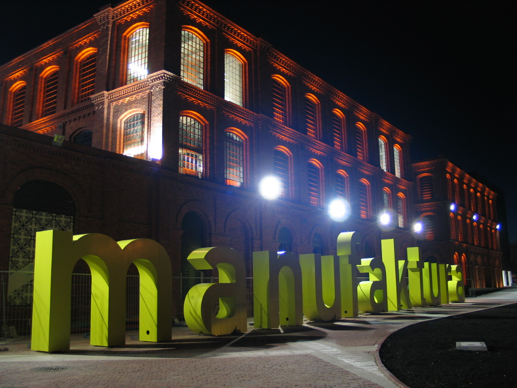 Centrum Manufaktura